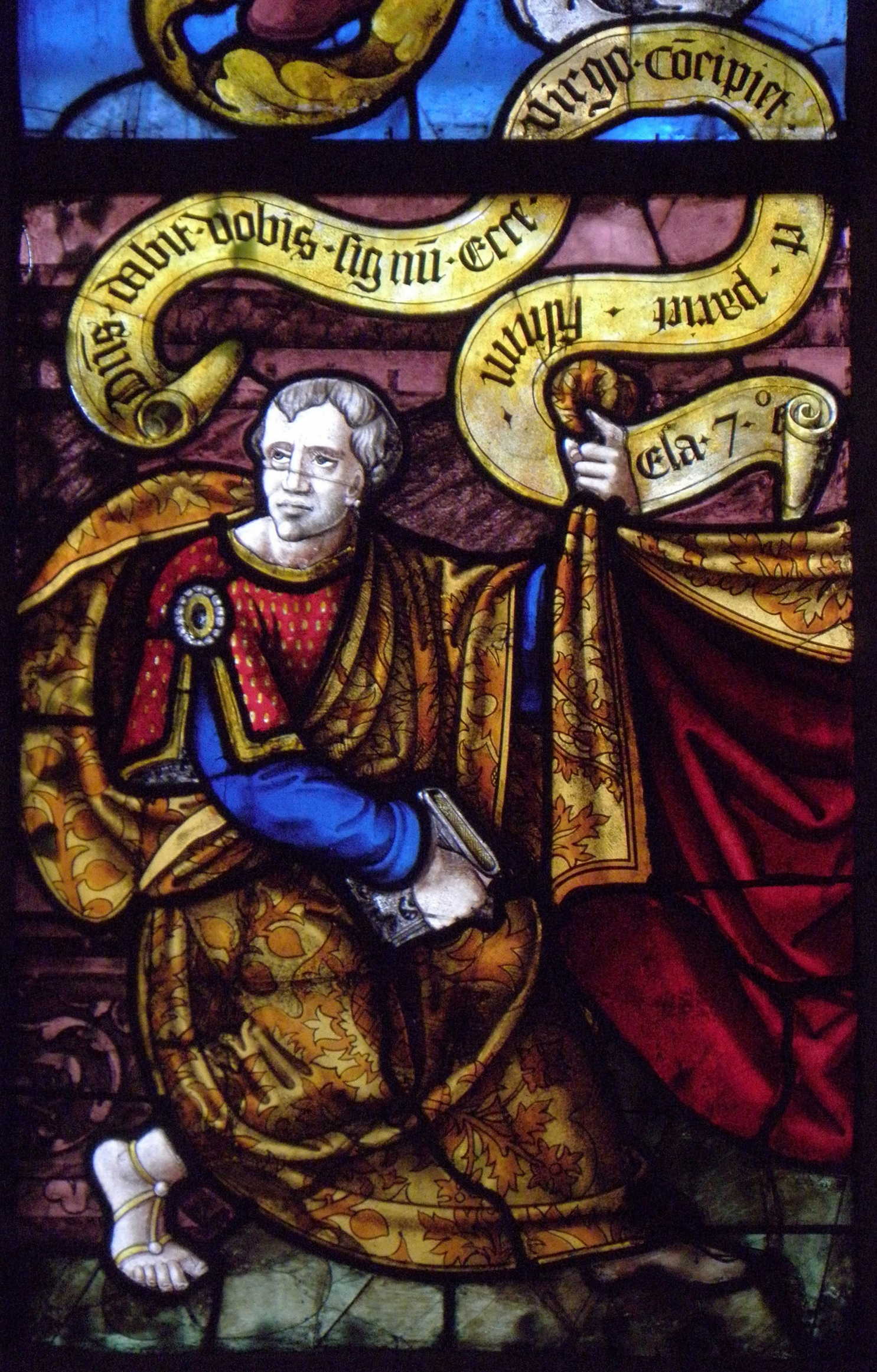 Vitrail de l'arbre de Jessé de l'église Saint-Pierre de Beignon (56).